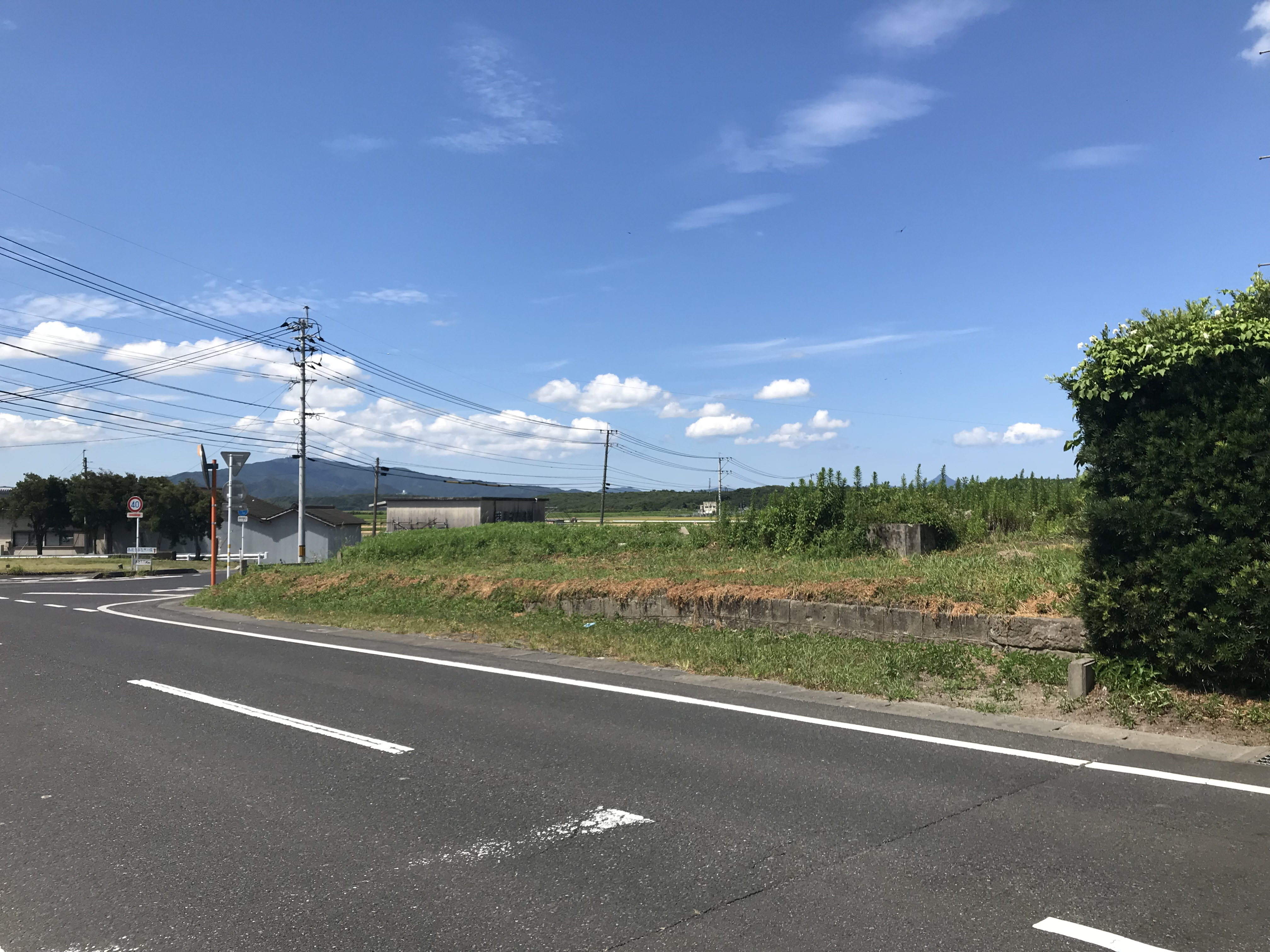 線路跡は農道になっている。南多夫施駅跡記念碑碑文によると貨物ホーム跡が残っていると記載されており、この写真の石積部分がそうだと思われる。